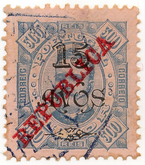 Briefmarke von Portugiesisch-Timor. Royale Briefmarke mit dem Stempel "Republica", 1910/1911 aktualisierter Wert von 300 Reis auf 15 Avos